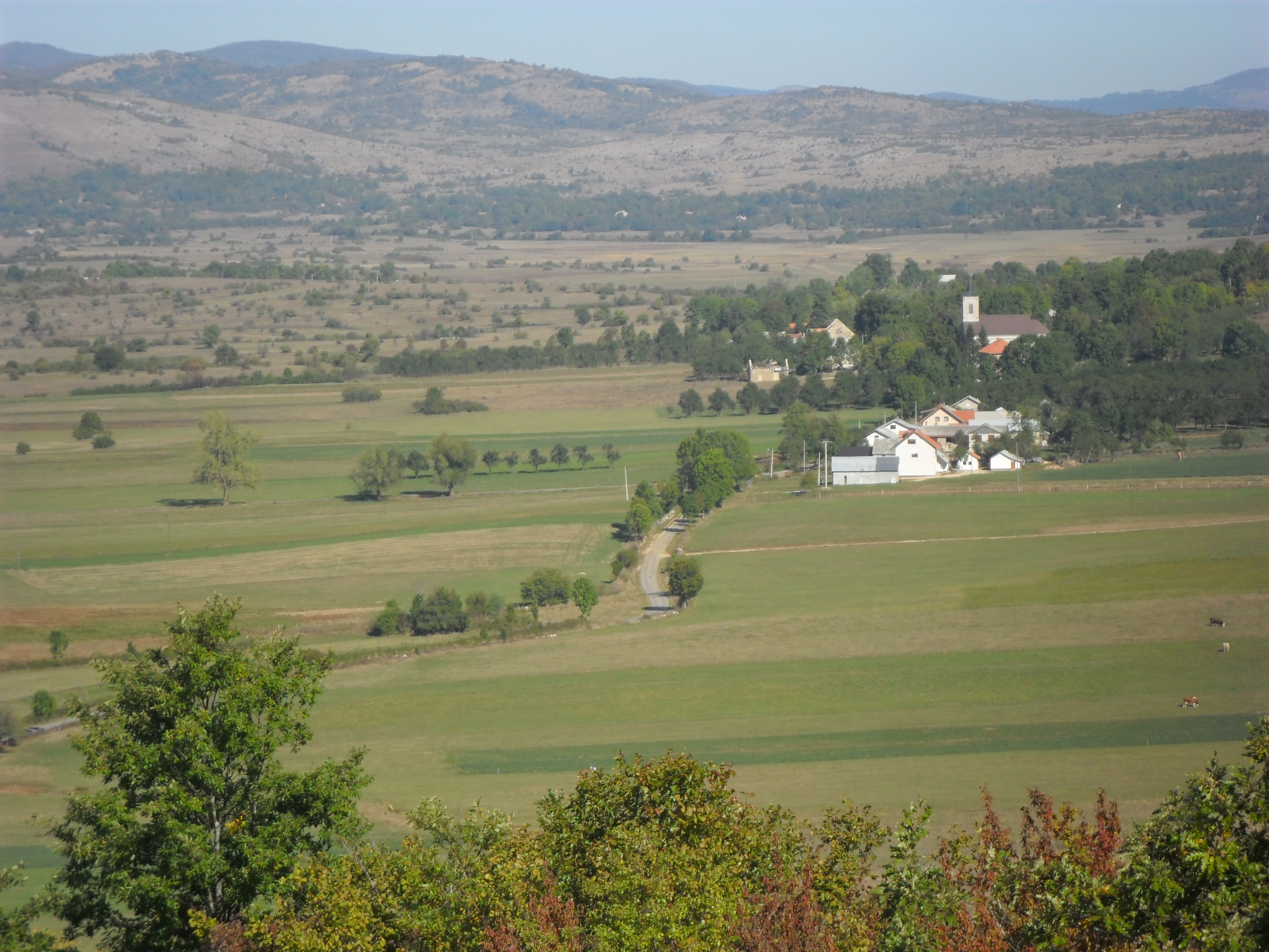 Podlapača , panorama